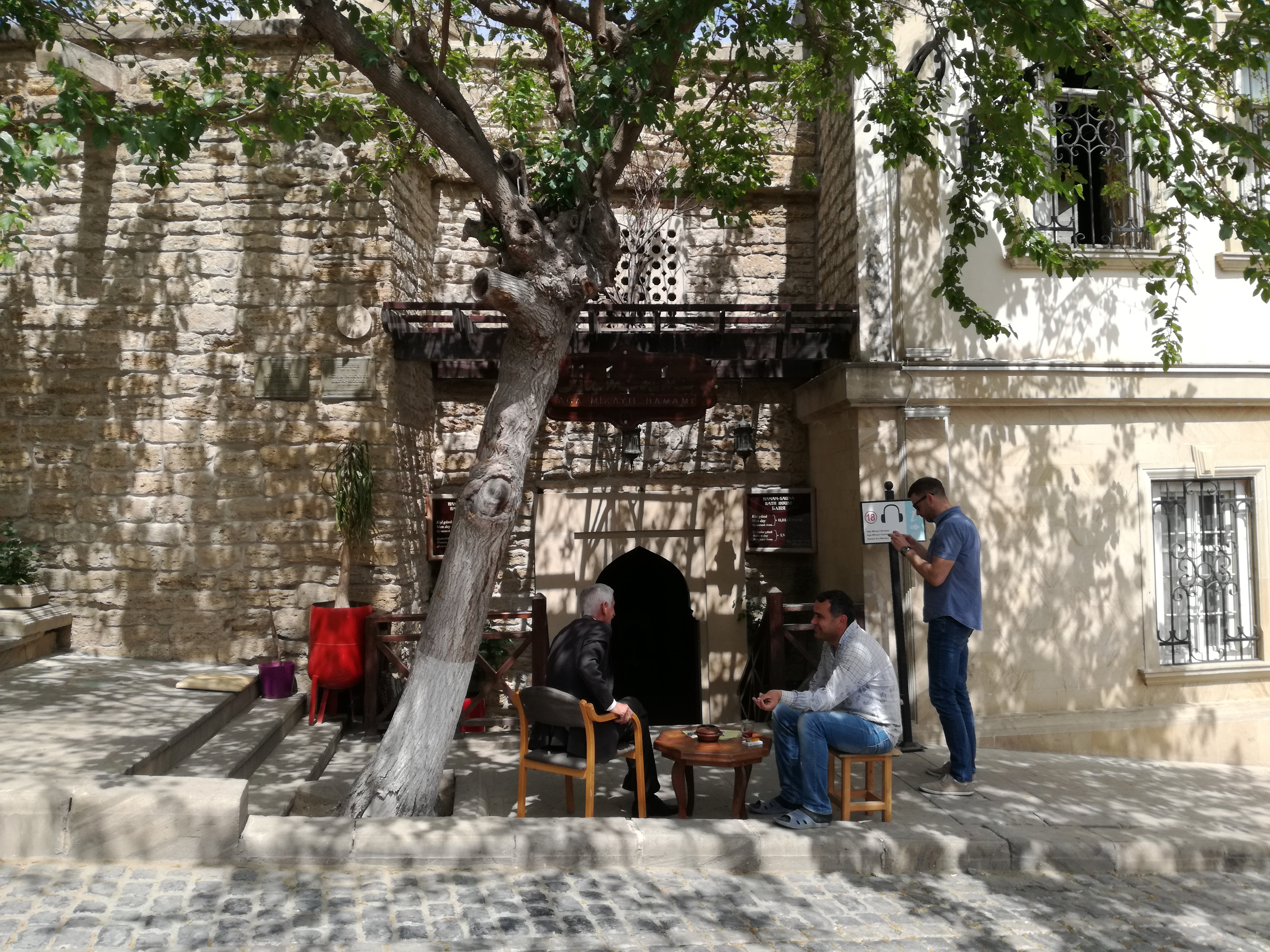 Улица Кичик Гала. Баня Ага Михаила